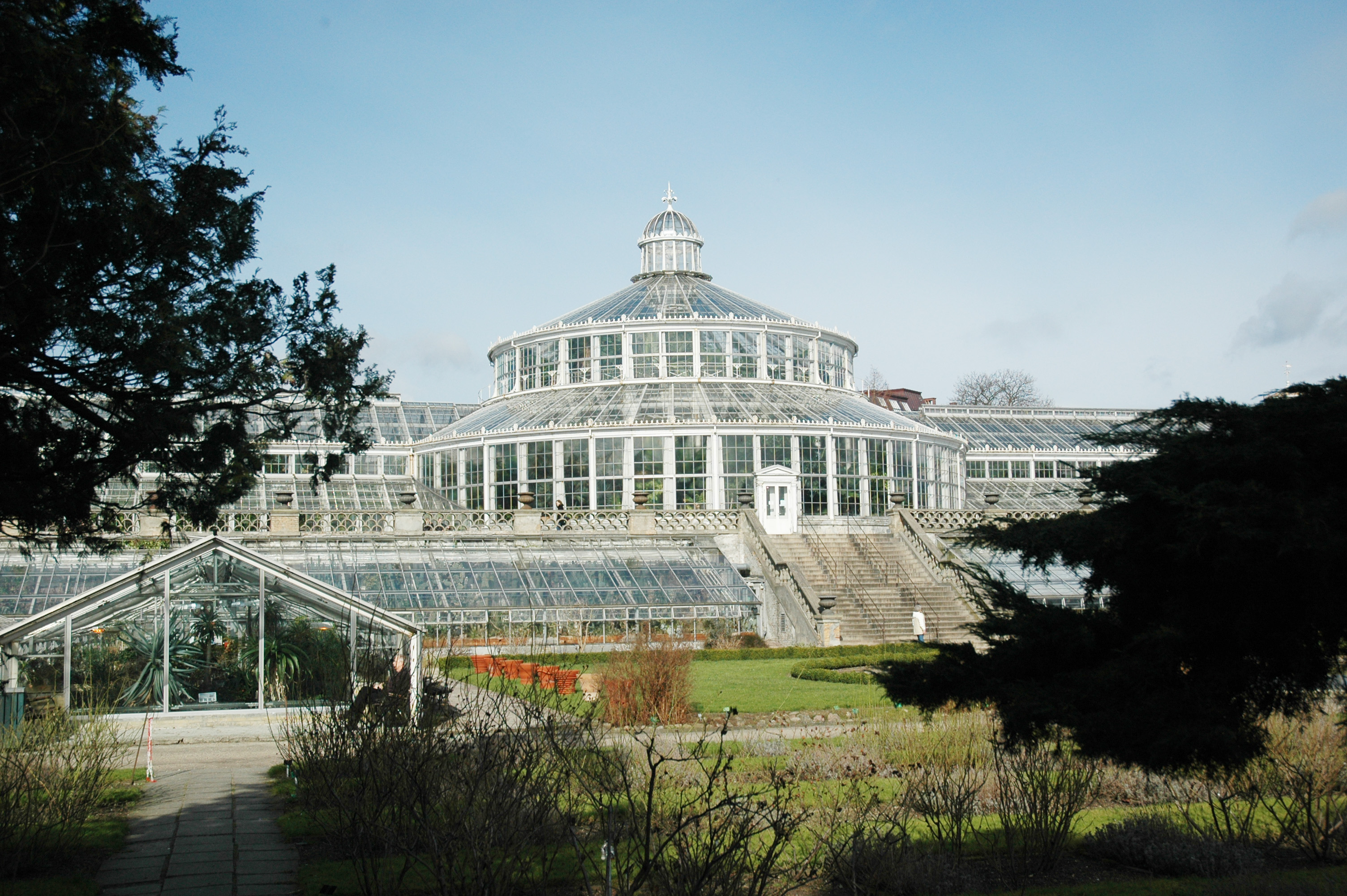 Botanisk have, Væksthuset